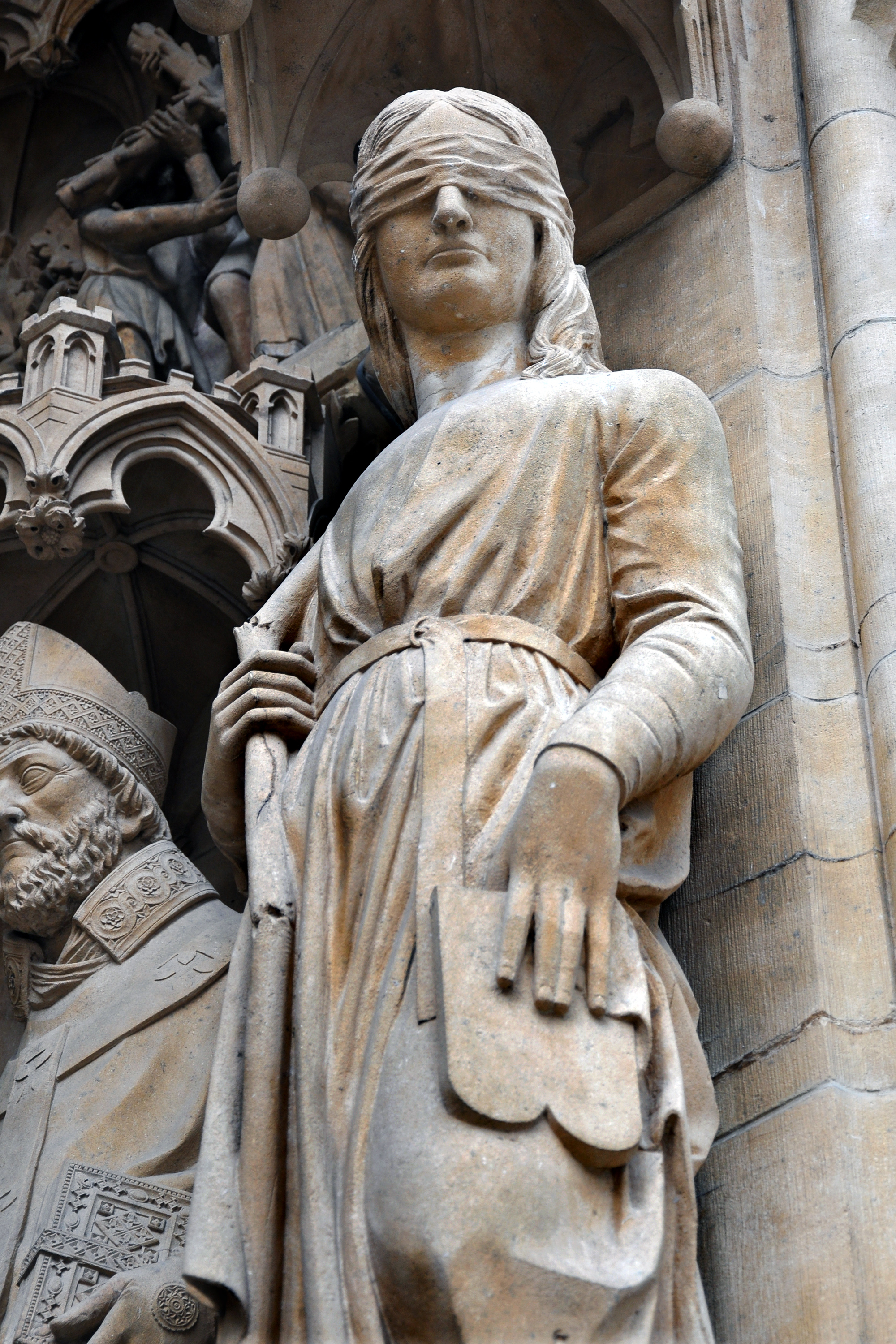 Cathédrale Saint-Etienne de Metz, le Portail de la Vierge. Allégorie de la Synagogue.